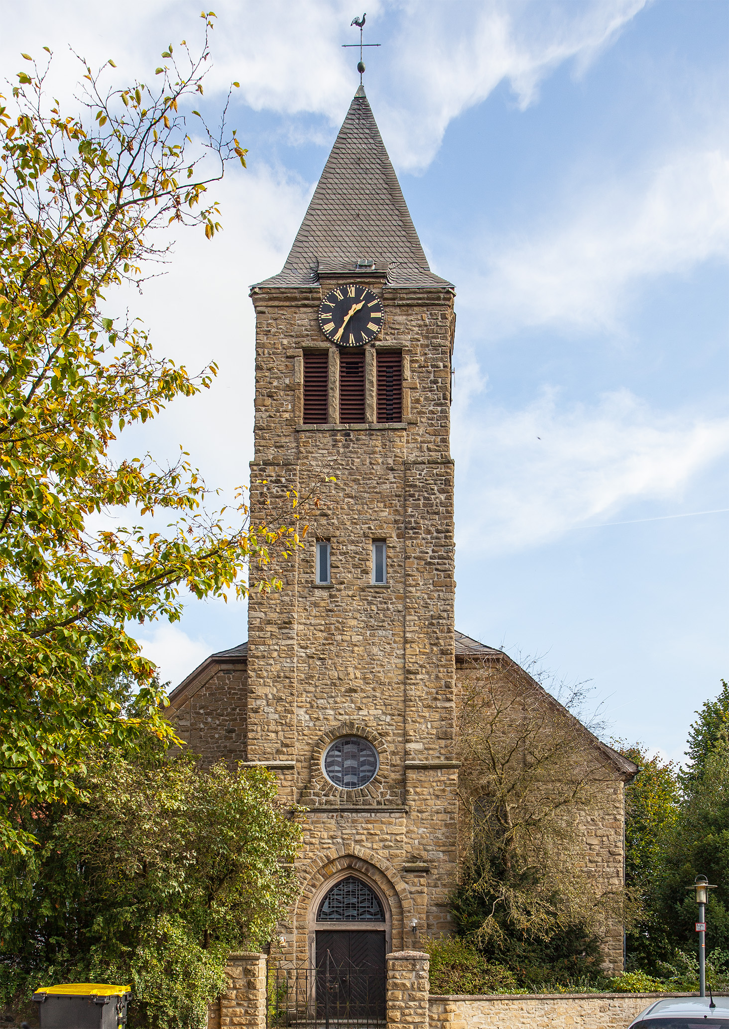 Ev.-ref.-Kirche in Lieme (Lemgo) This is a photograph of an architectural monument. It is on the list of cultural monuments of Lemgo